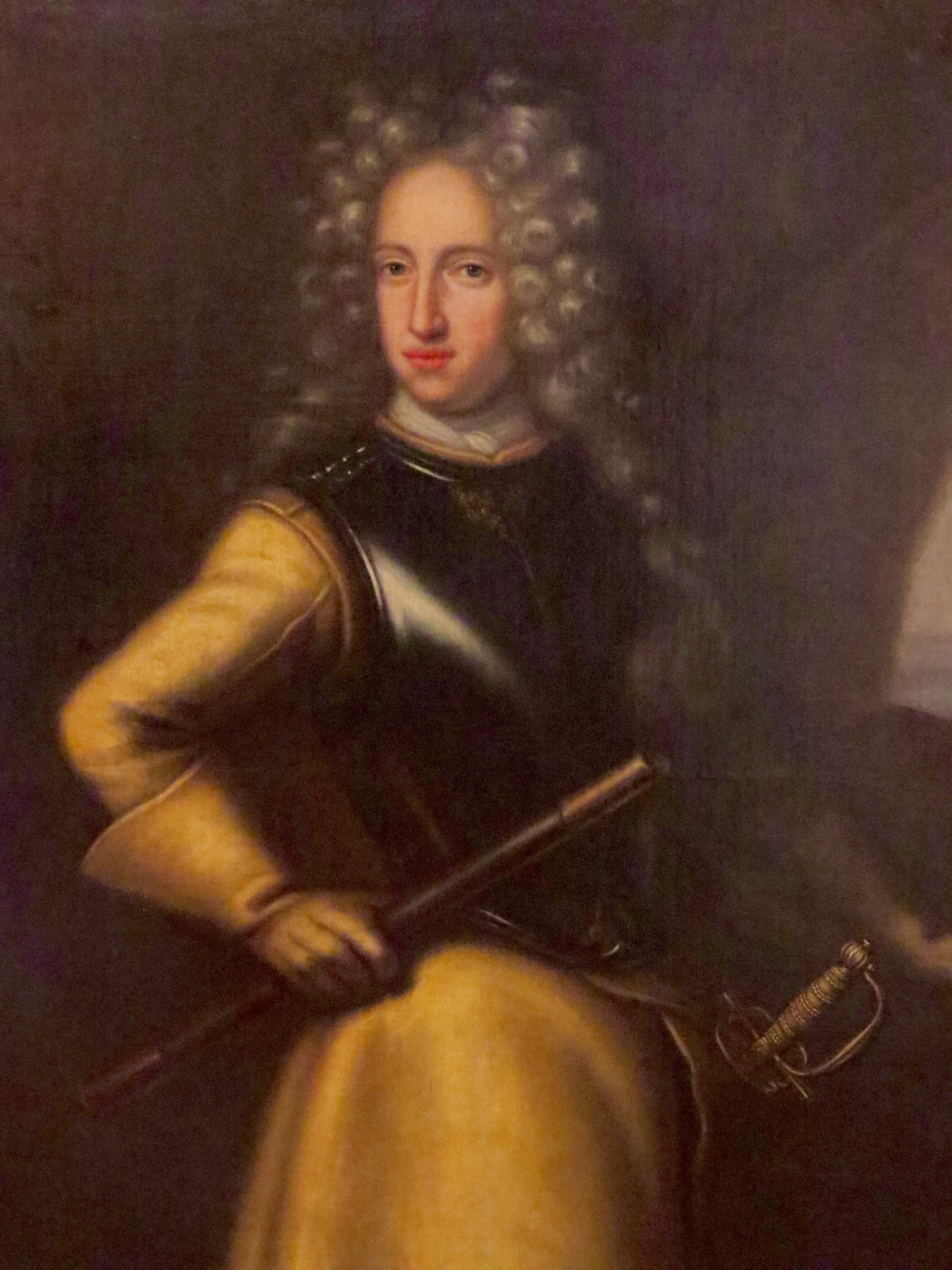 Frederik IV af Slesvig-Holsten–Gottorp (1671-1702), David Klöcker von Ehrenstrahl, Gottorp Slot, Sydslesvig